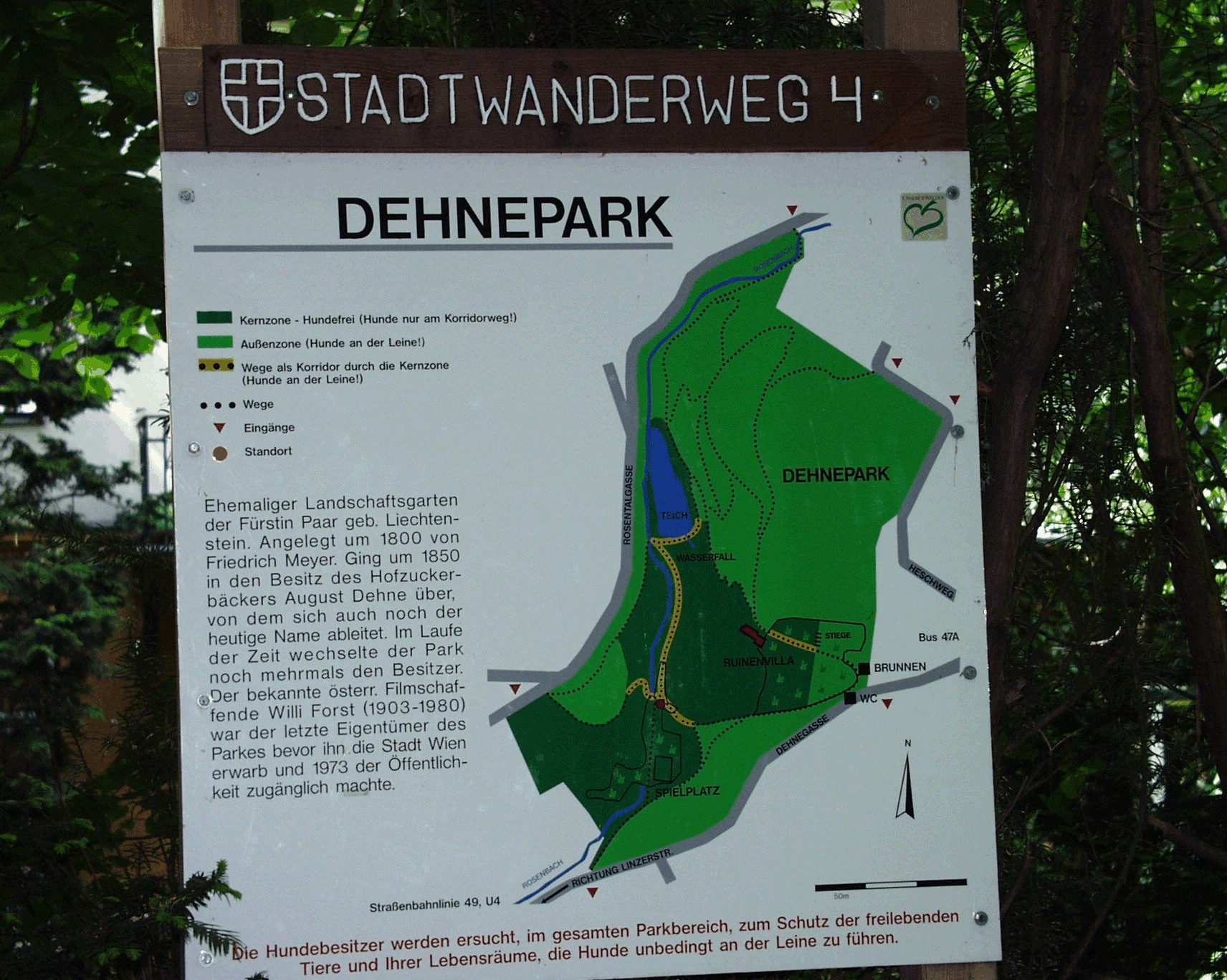 Dehneschild